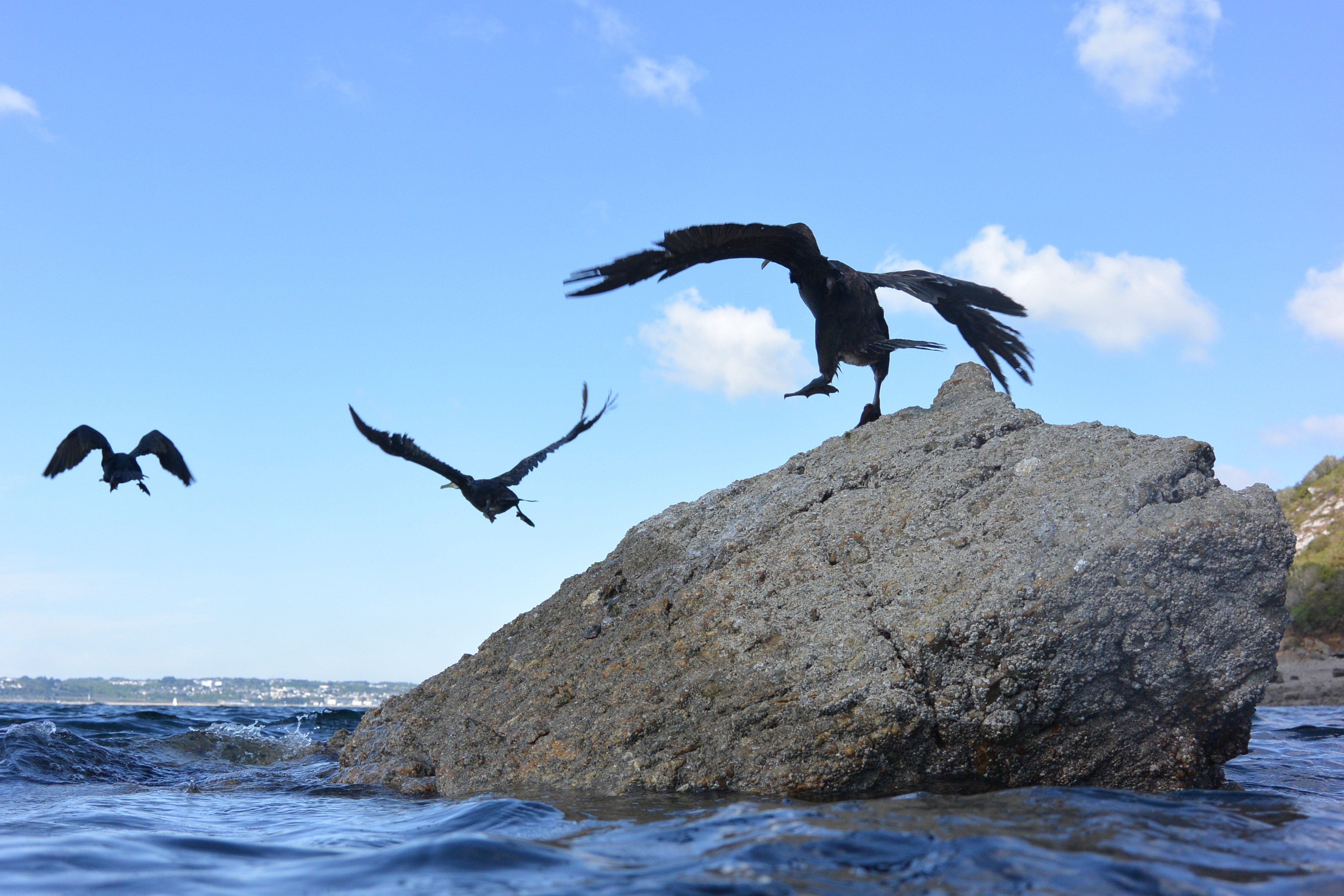 Envol de trois cormorans dans la rade de Brest